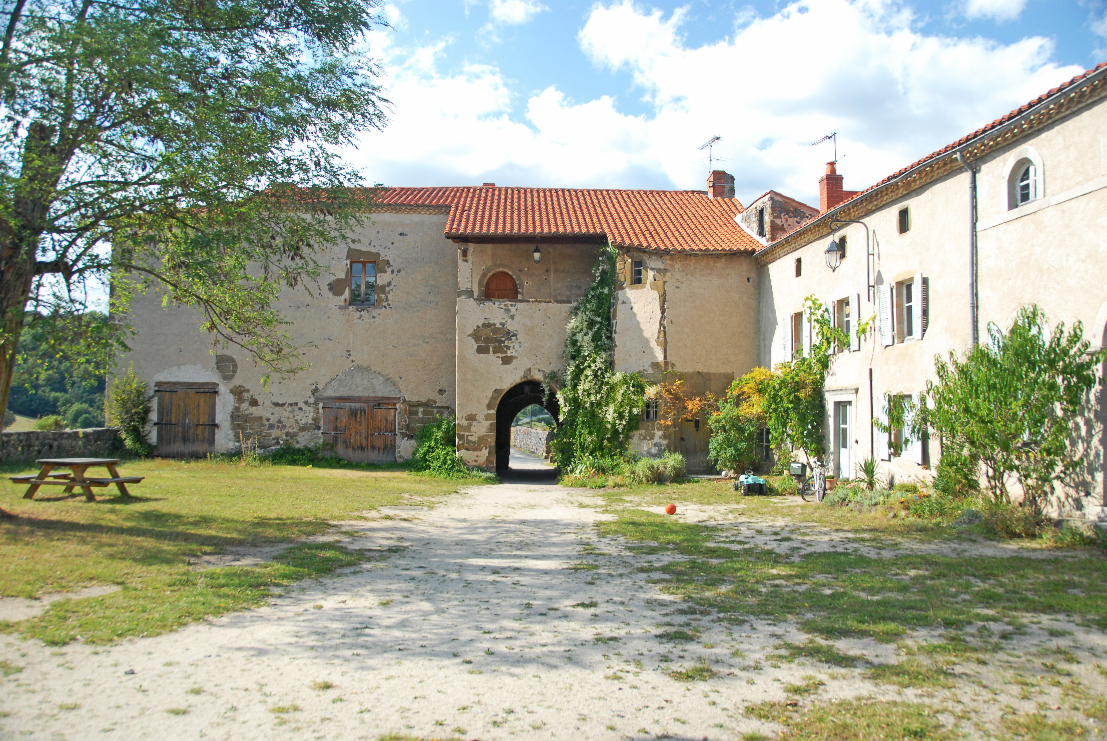 Chanteuges, Eingangshof von S